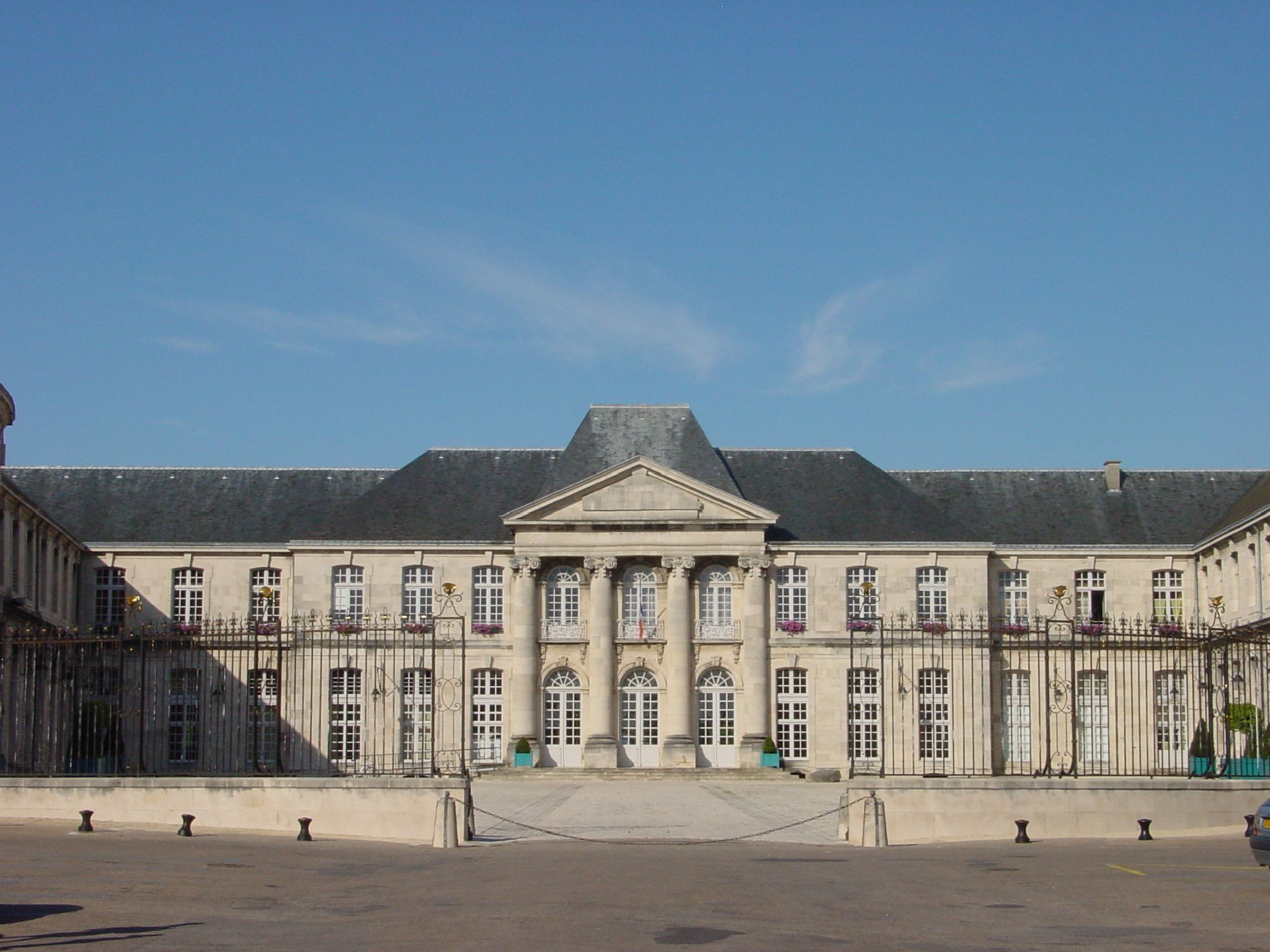 Château de Stanislas à Commercy (Meuse, France)